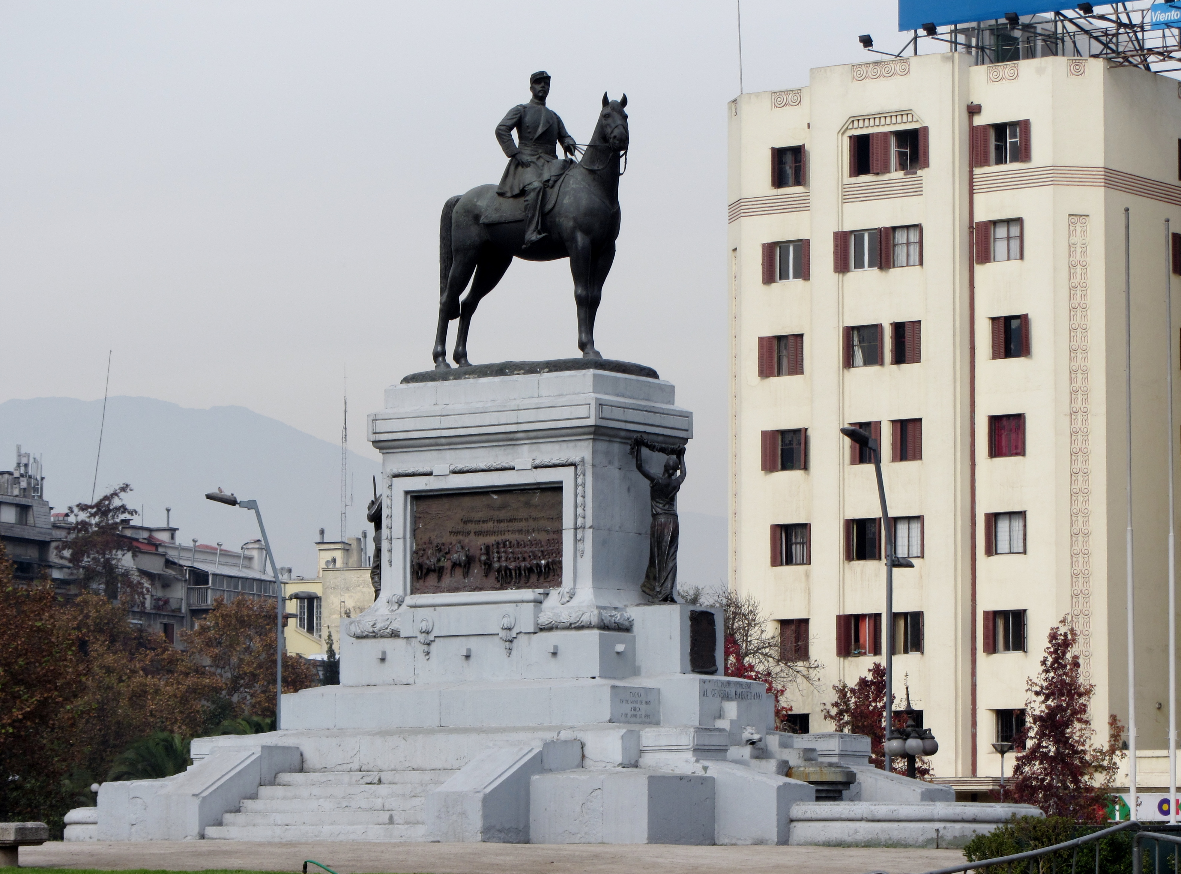 Monumento al general Baquedano, del escultor chileno Virginio Arias, en la plaza Baquedano, Santiago de Chile.